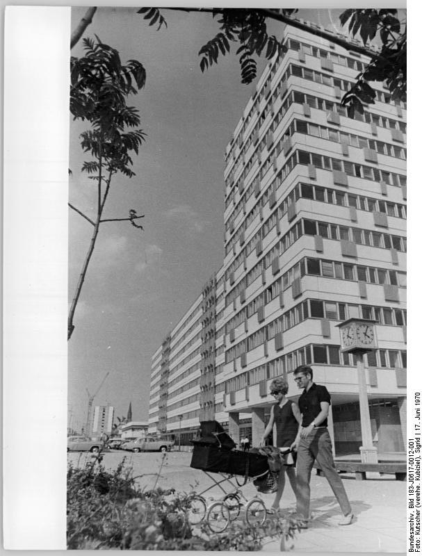 Berlin, Alexanderplatz, Neubauten, Wohnblocks Zentralbild Kutscher 17.6.70 Berlin: Neuaufbau Stadtzentrum - Das Haus der Statistik, ehemals Jugendobjekt der Bauarbeiter vom IHB der Hauptstadt, wurde 1969 zum 20. Jahrestag der DDR drei Monate vorfristig den Kollegen der staatlichen Zentralen Verwaltung für Statistik übergeben. Das Gebäude belebt den Häusertrakt um den Alexanderplatz.